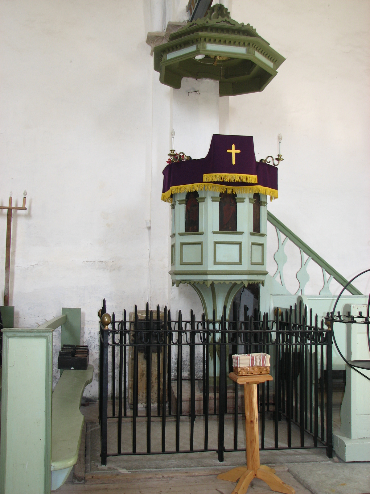 Kantsel Kullamaa kirikus, M. Matties, 17. sajand (puit, õli)